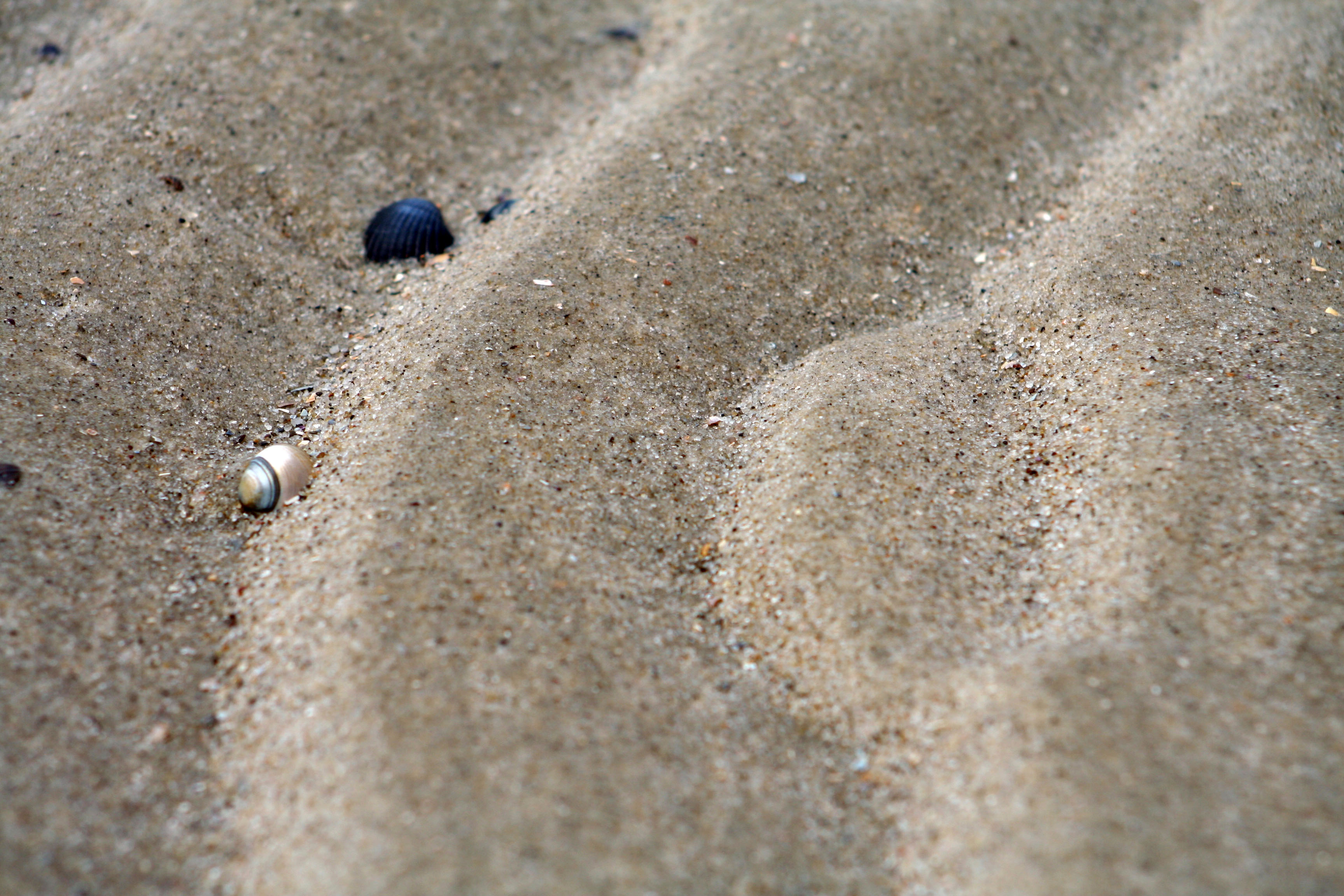 Rippelbildungen am Strand von Spiekeroog